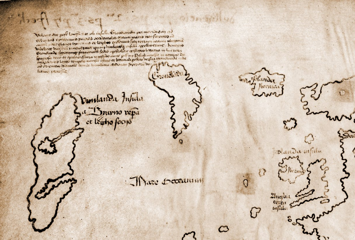 Ausschnitt der Vinland-Karte oben links